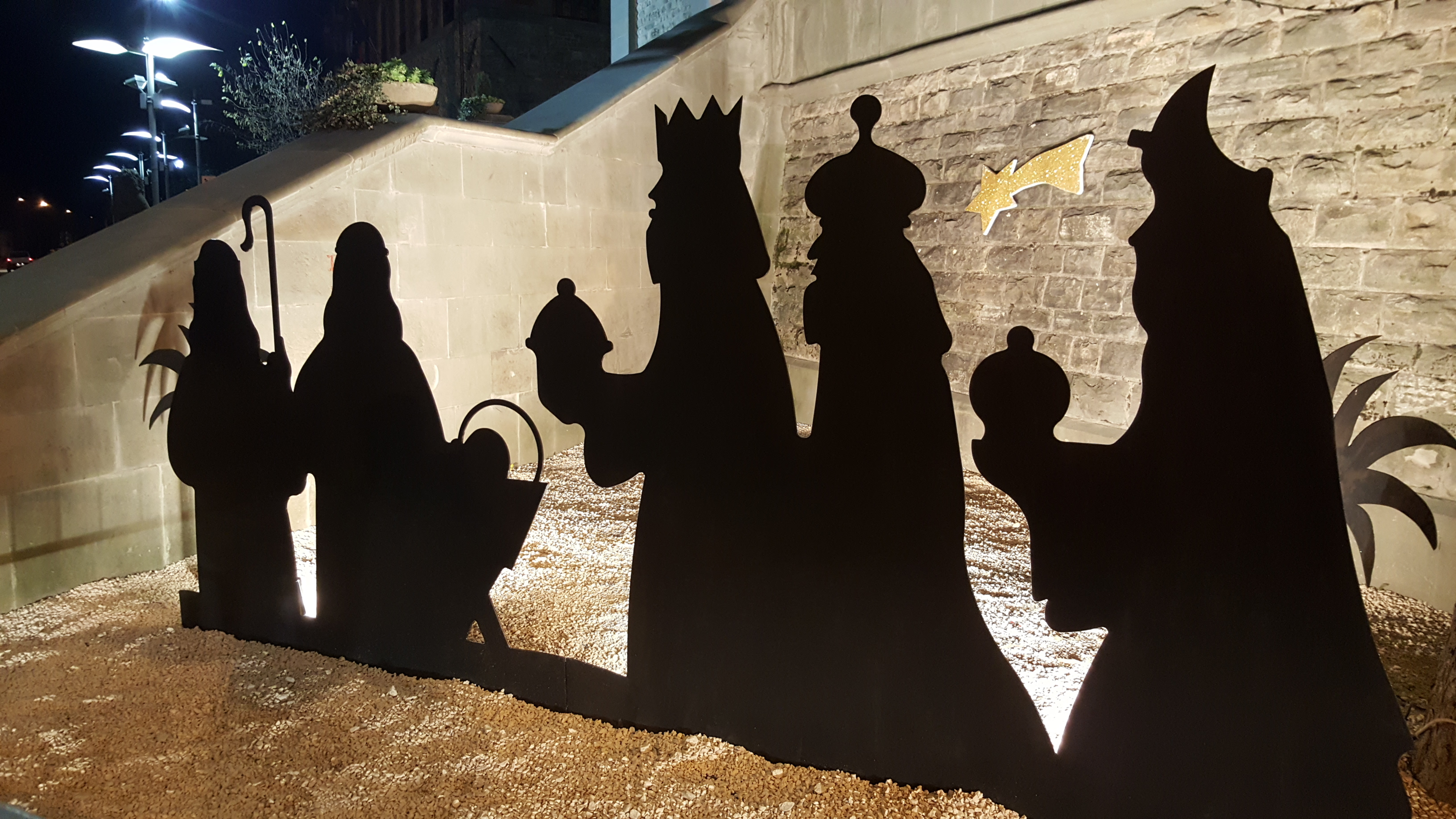 Presepio This is a photo of a monument which is part of cultural heritage of Italy.